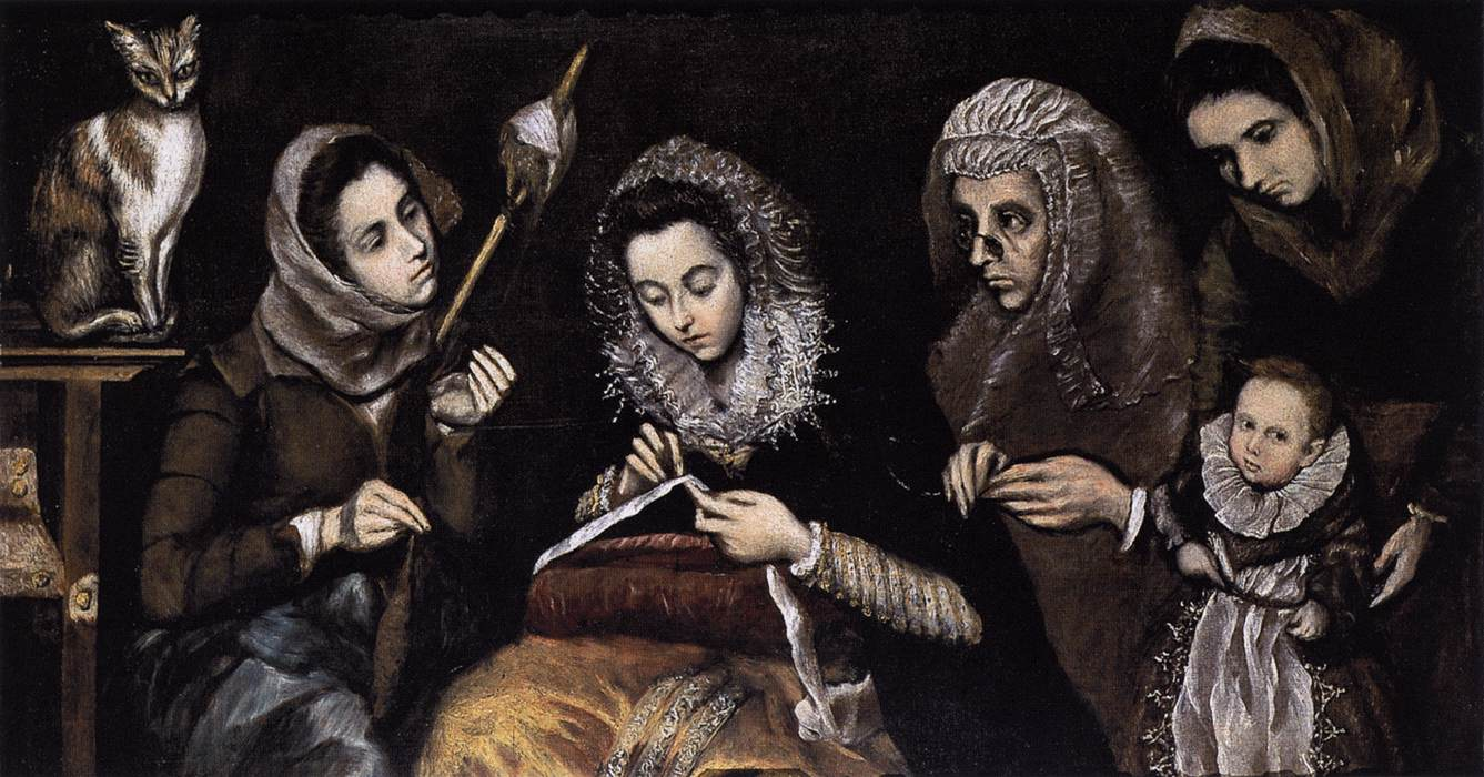 La obra representa a la familia del célebre pintor cretense conocido mundialmente por su sobrenombre de El Greco.